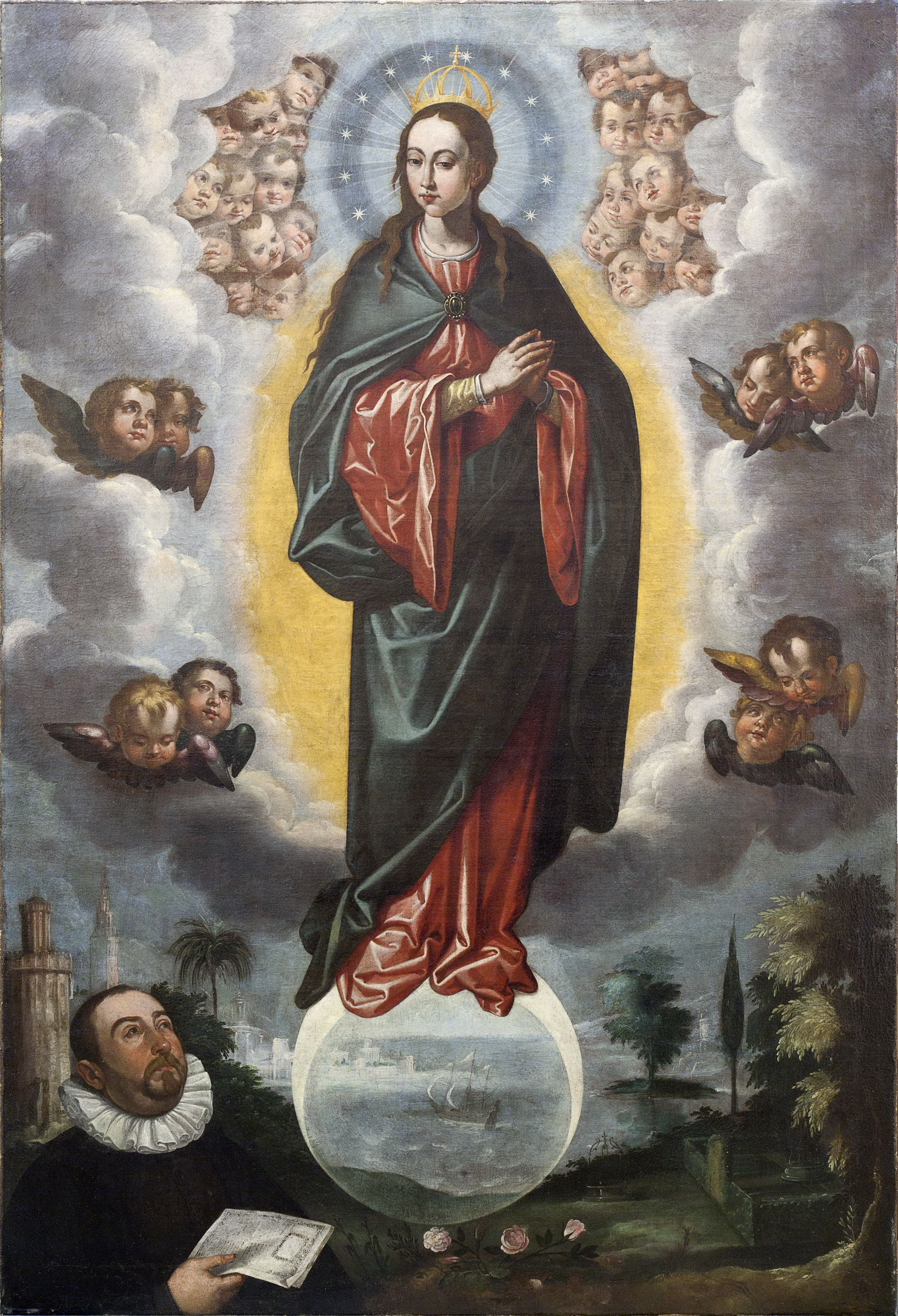 Esta obra, que representa la Inmaculada Concepción de la Virgen María, madre de Jesucristo, estuvo colocada en la Sacristía de los Cálices de la catedral de Sevilla, (España), y fue pintada por Francisco Pacheco en 1619.